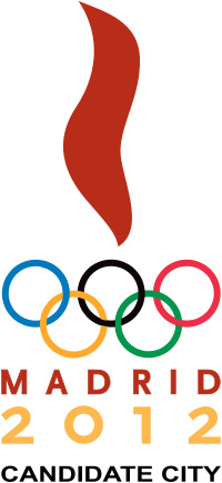 Logotipo de la candidatura Madrid 2012